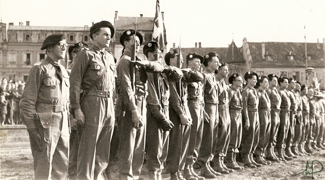 Colmar, 8 février 1945. De gauche à droite, lieutenant-colonel Gambiez, capitaine Lefort commandant le 1er bataillon de Choc , le 6e est le capitaine Toussaint qui sera décoré un peu plus tard de la légion d'honneur par le Général De Lattre. Collection Henri Simorre. Autorisation de publier la photographie via le site (Cf.